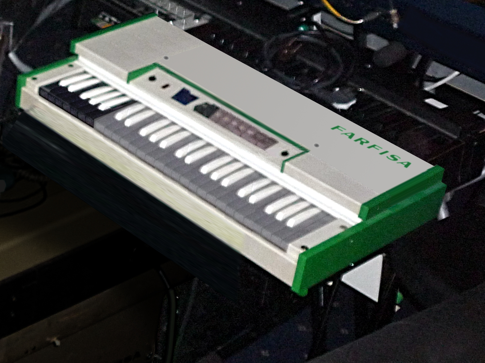 Farfisa FAST3